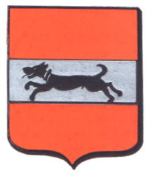 Wapen van Damme